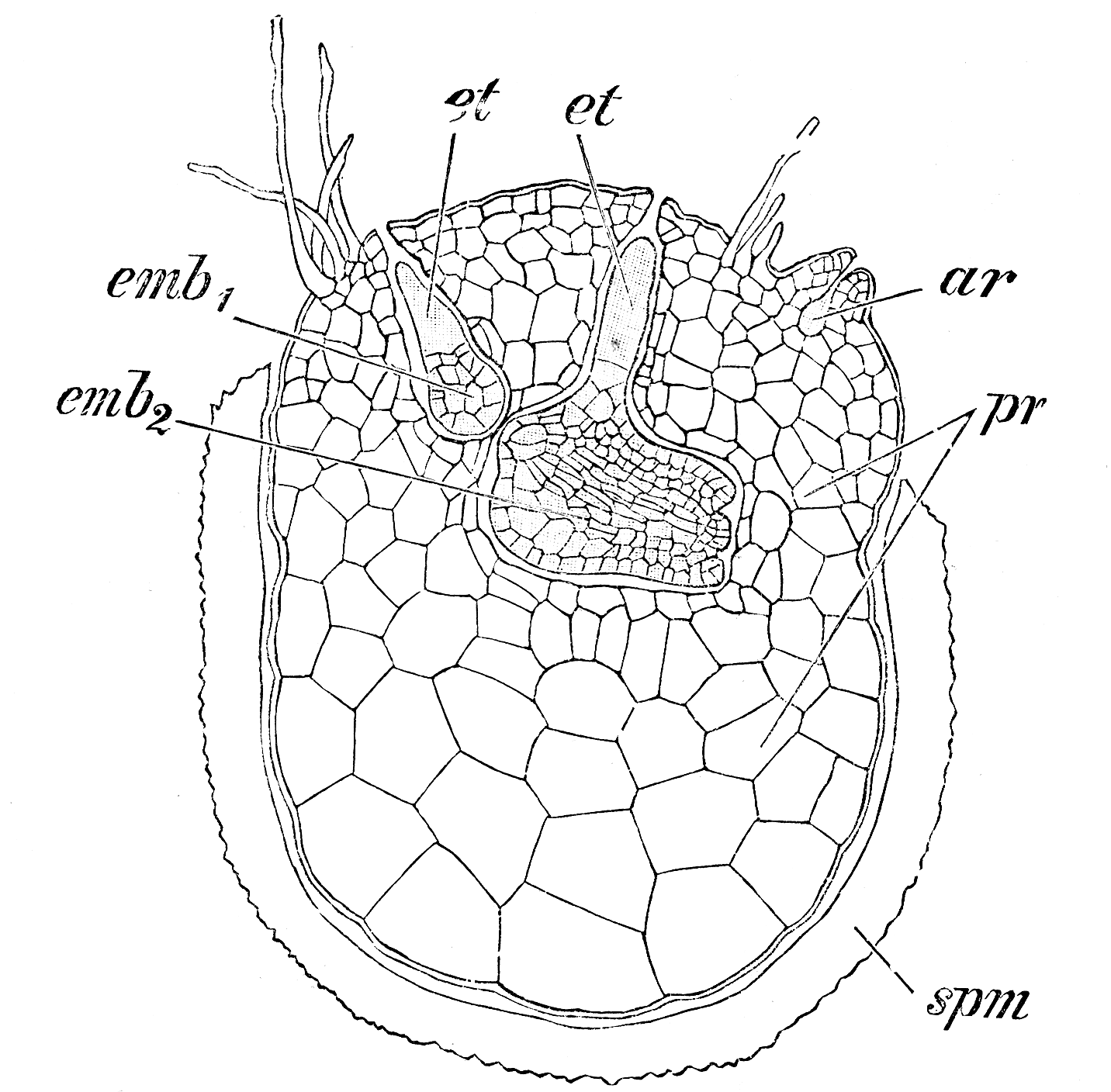 Selaginella martensii. Weibliches Prothallium, aus der am Scheitel geöffneten Megasporenwand spm hervortretend, ar = unbefruchtet gebliebenes Archegonium, emb1, emb2 zwei in das Prothalliumgewebe eingesenkte Embryonen mit den Embryoträgern et. nach Pfeffer